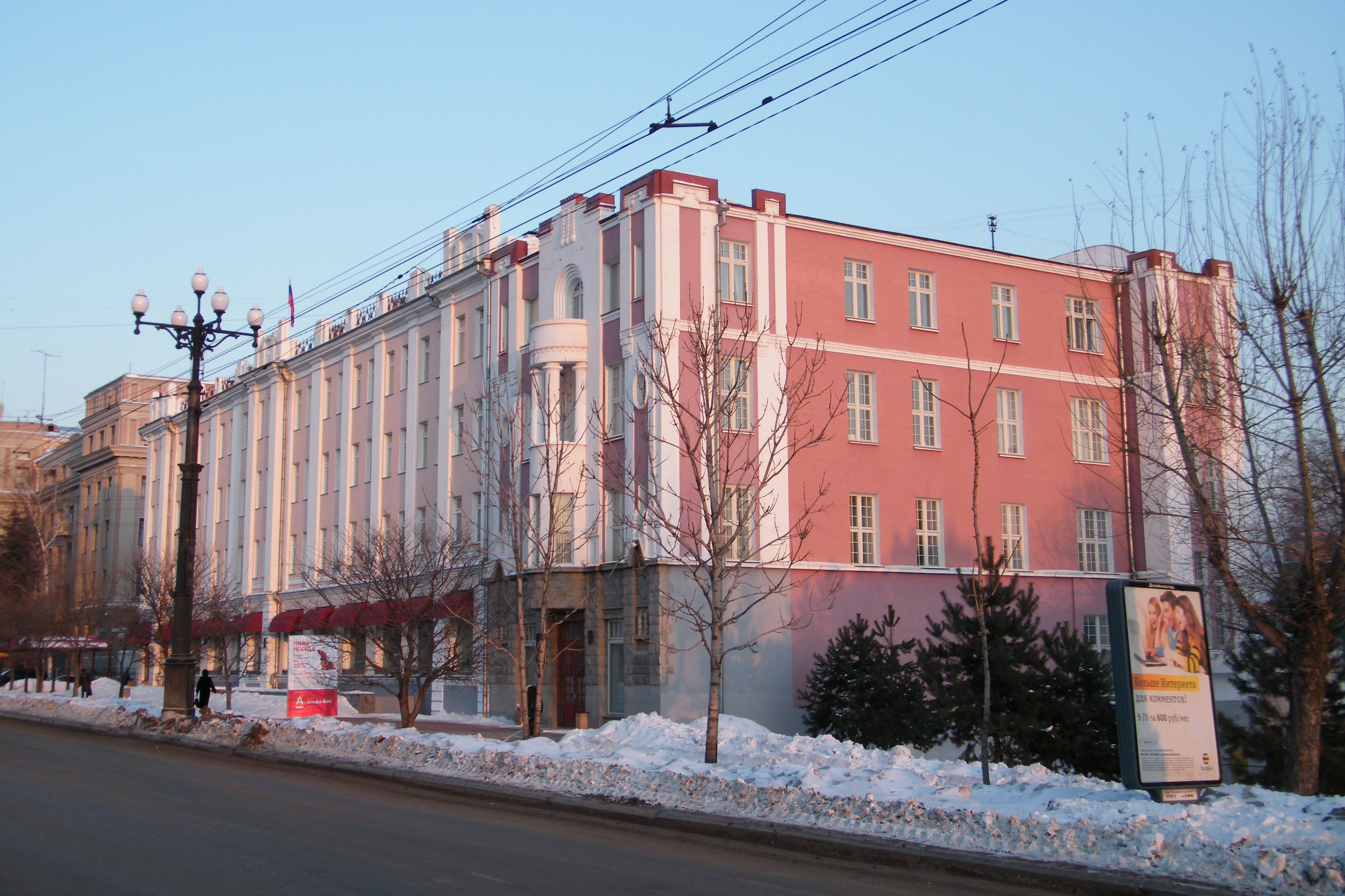 Министерство Российской Федерации по развитию Дальнего Востока, Хабаровск, ул. Муравьёва-Амурского 18. Дом построен в 1913 году, памятник архитектуры.